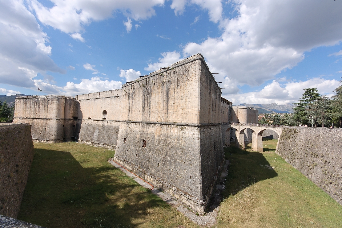 L'Aquila 2011